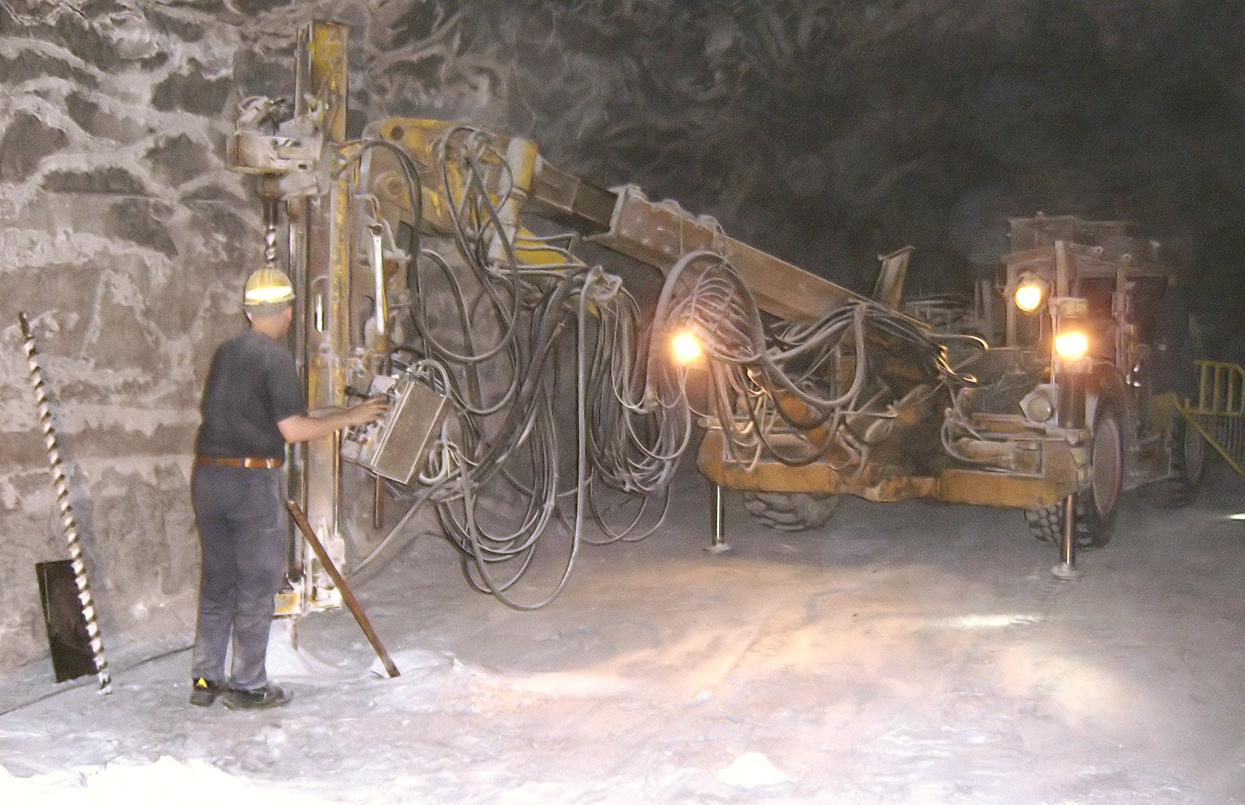 Strossenbohrwagen im Einsatz. Standort: Steinsalzbergwerk Bernburg der "esco - european salt company GmbH & Co. KG, Kustrenaer Weg 7, 06406 Bernburg (Saale)"